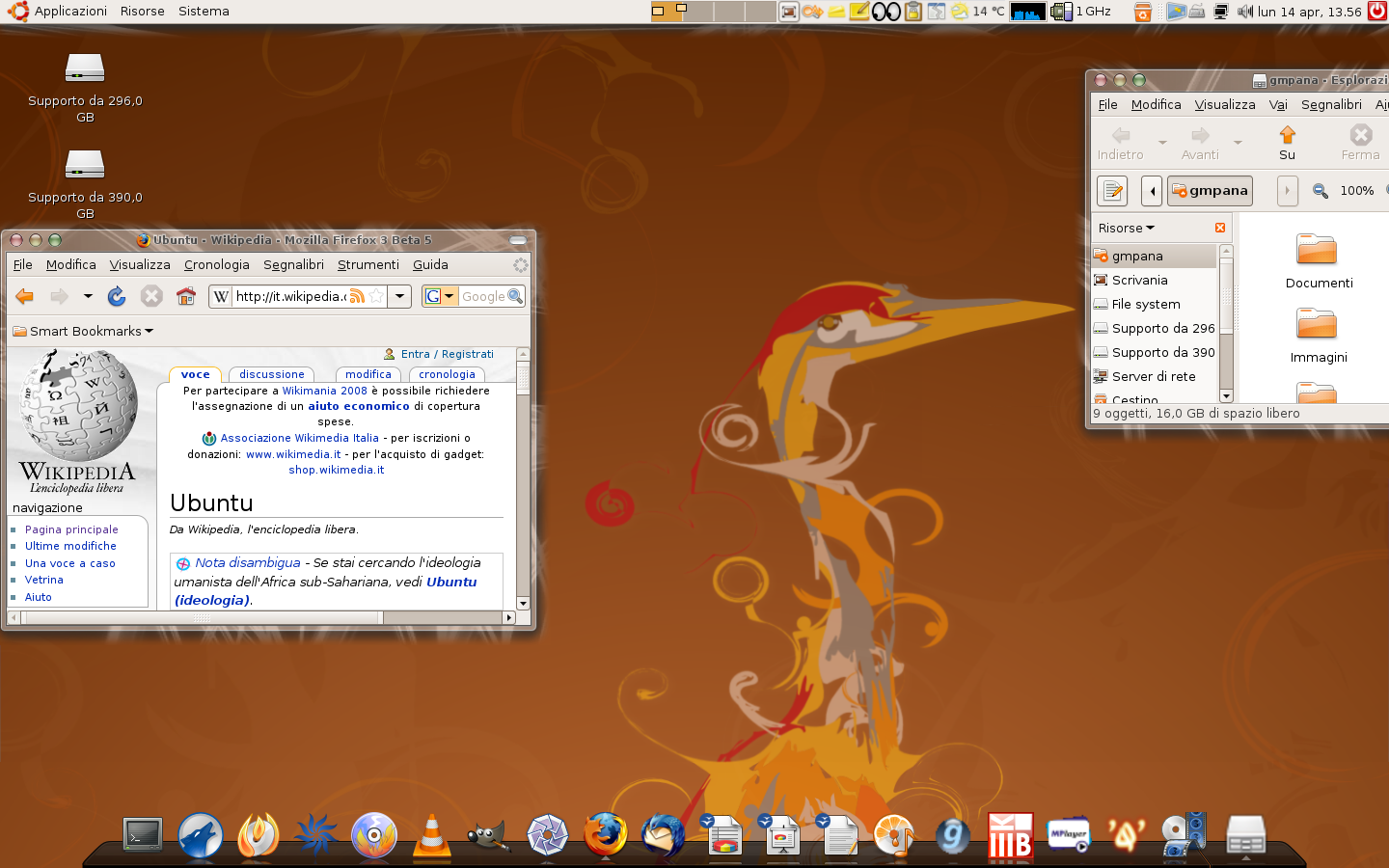 Ubuntu 8.04 Desktop